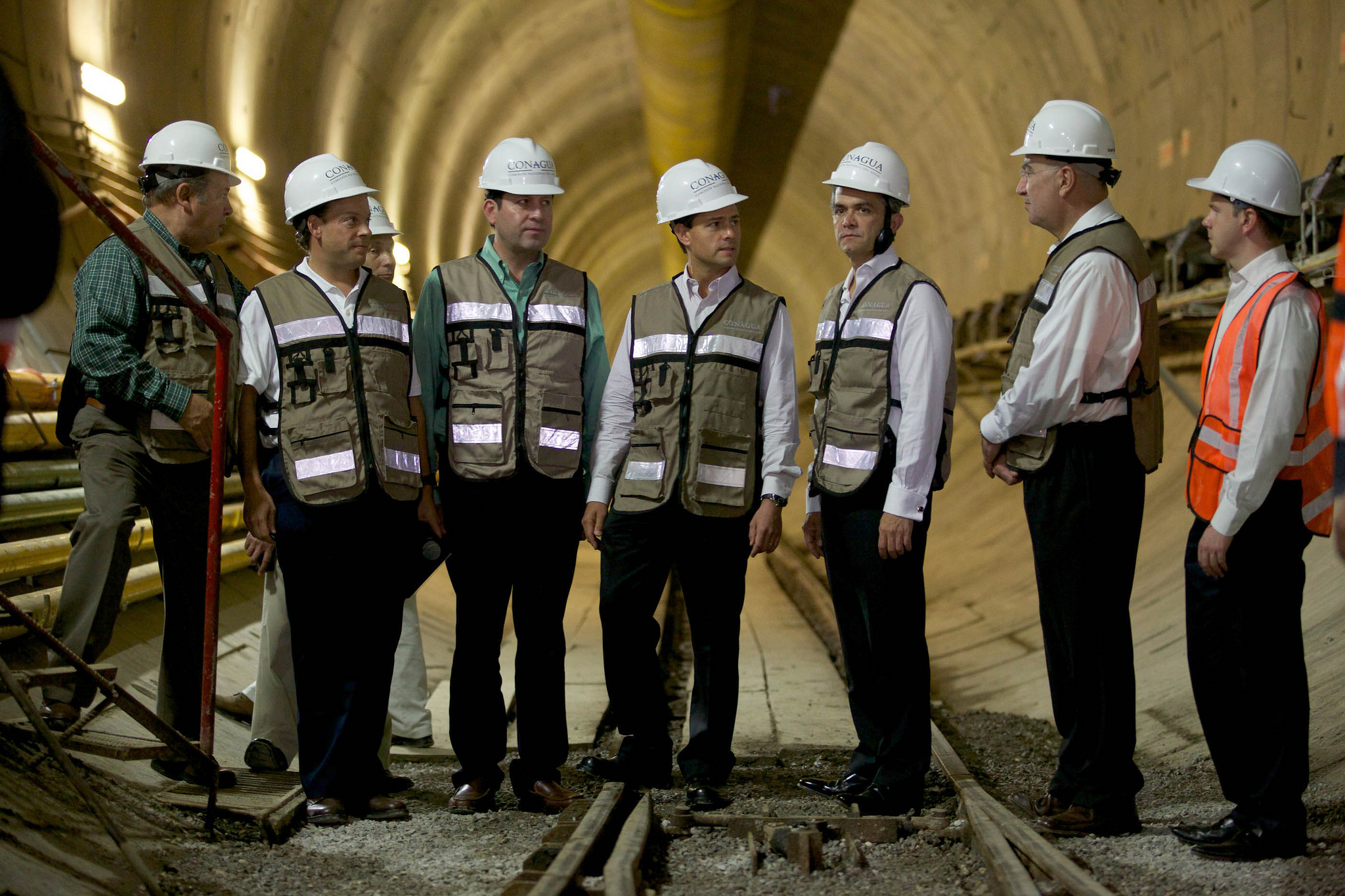 Enrique Peña Nieto y Miguel Ángel Mancera. Puesta en operación de los primeros 10 kilómetros del Túnel Emisor Oriente (TEO). Ecatepec de Morelos, Estado de México. 13 de junio de 2013.